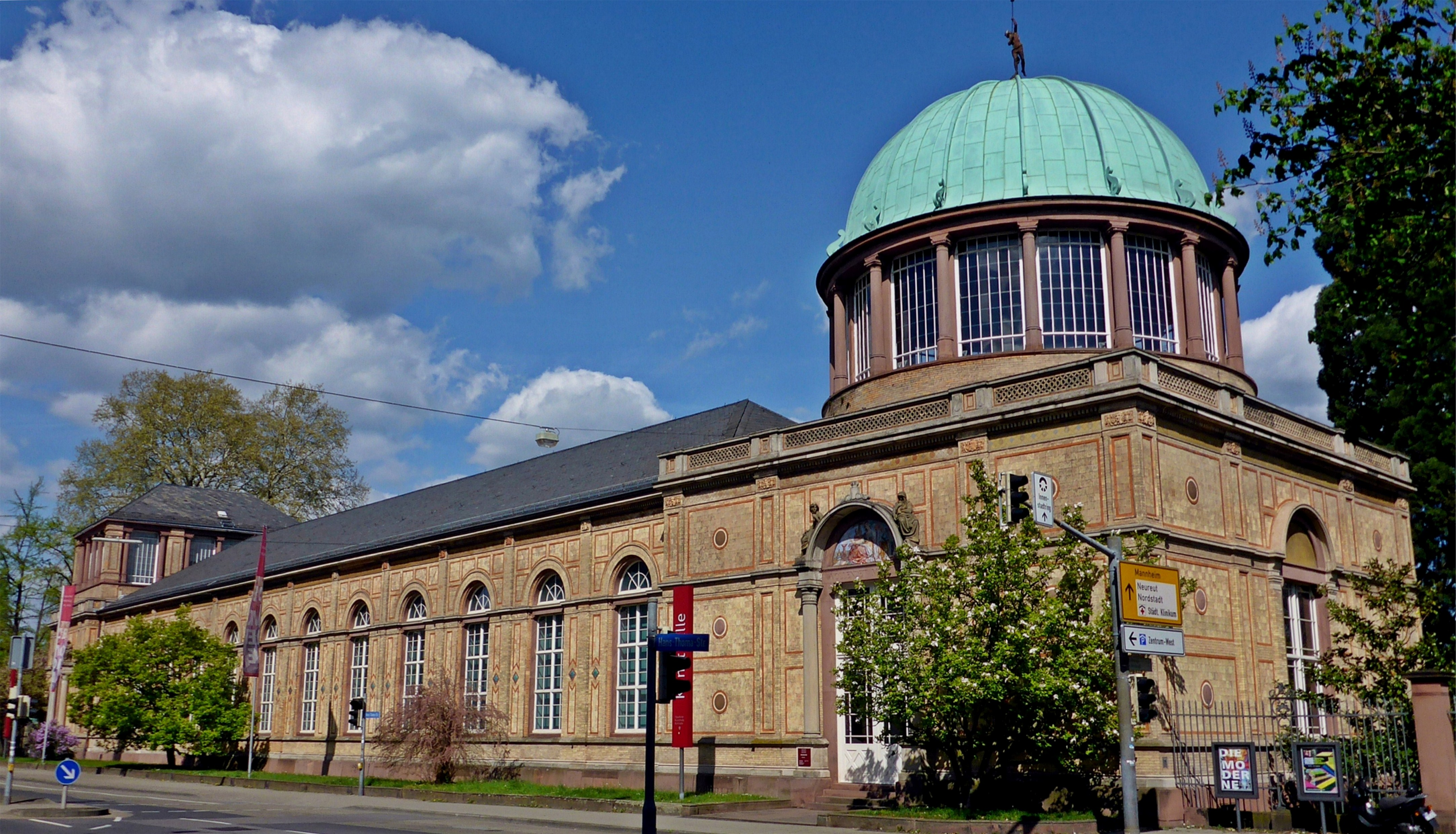 Botanischer Garten Orangerie, heute Kunsthalle Karlsruhe